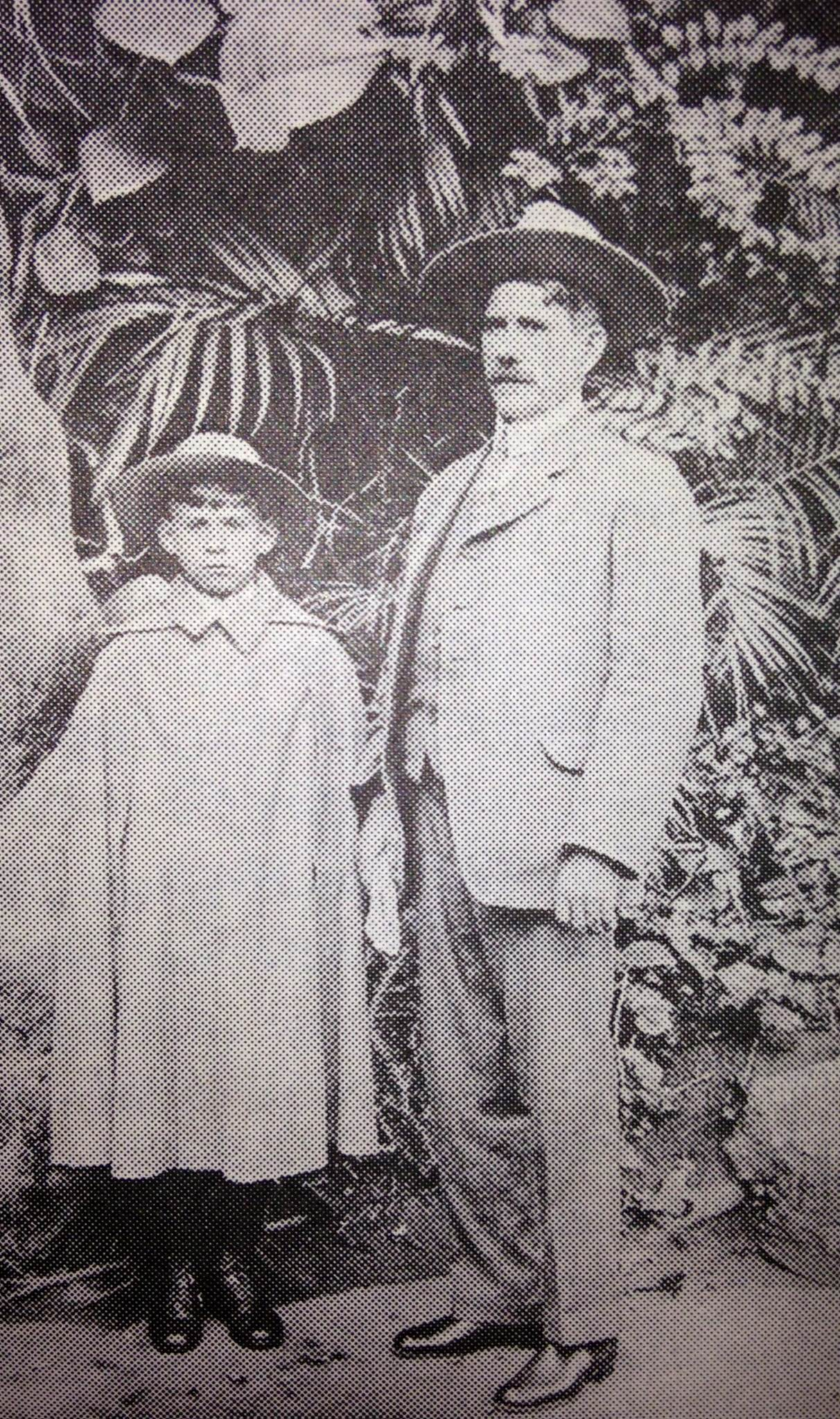 O ex-prefeito João Vicente Ferreira com seu filho